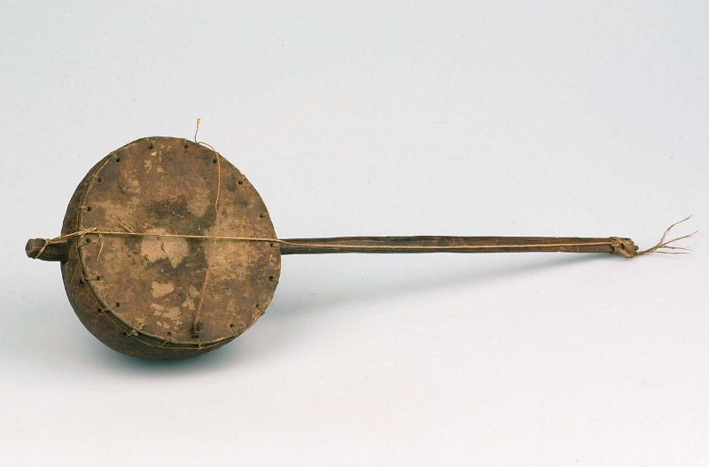 Strijkinstrument. Strijkluit van kokosnoot met één snaar Unknown language: Robeka